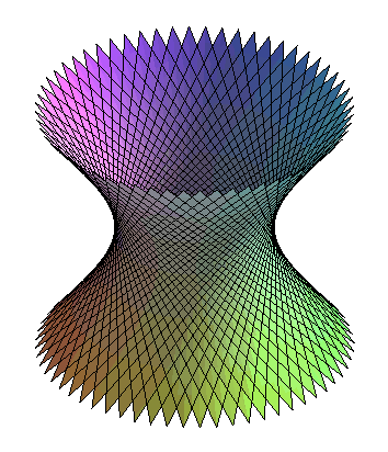 Hyperboloïde à une nappe : surface réglée Licensing Source : image créée par l'auteur (Theon)